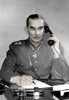 Kenraaliluutnantti V. P. Nenonen